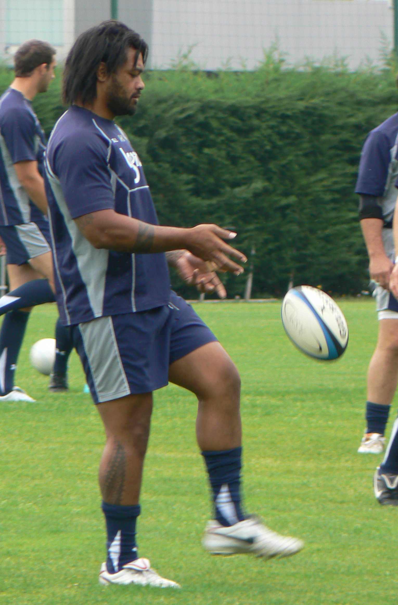 Le rugbyman néo-zélandais Sione Lauaki lors d'une entrainement avec l'ASM Clermont Auvergne.